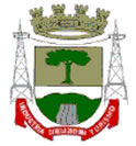 Brasão do Município de Canela, RS, Brasil